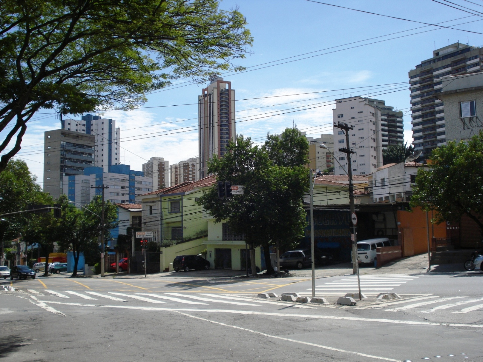 Final da Avenida Pompéia, zona oeste de São Paulo, SP.